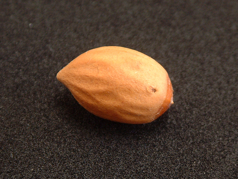 繋ぎ榧。越後七不思議の一つ。針で突いて穴をつけたようなくぼみが特徴。